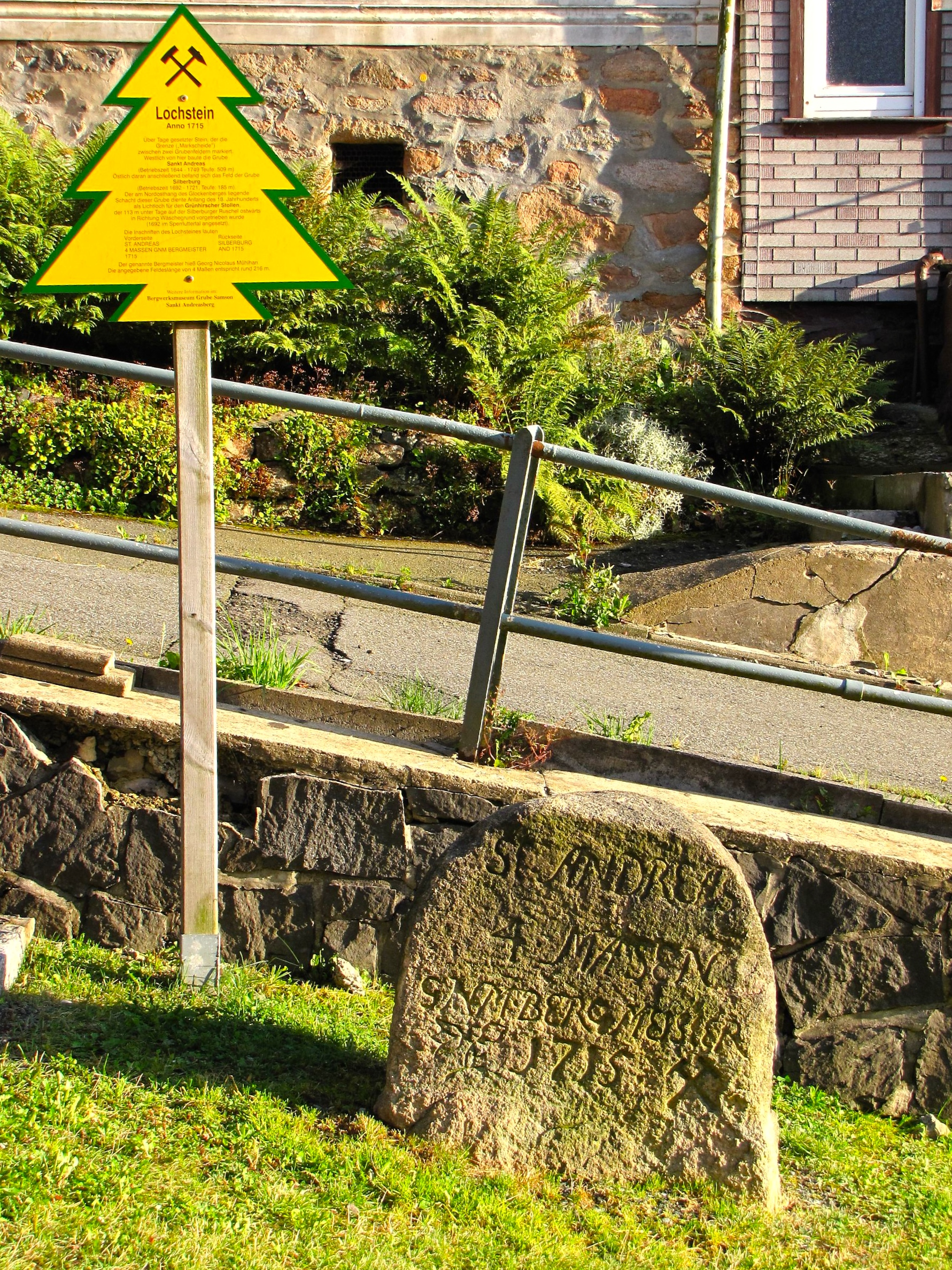 Lochstein zwischen den Gruben Sankt Andreas und Silberburg in Sankt Andreasberg/Oberharz